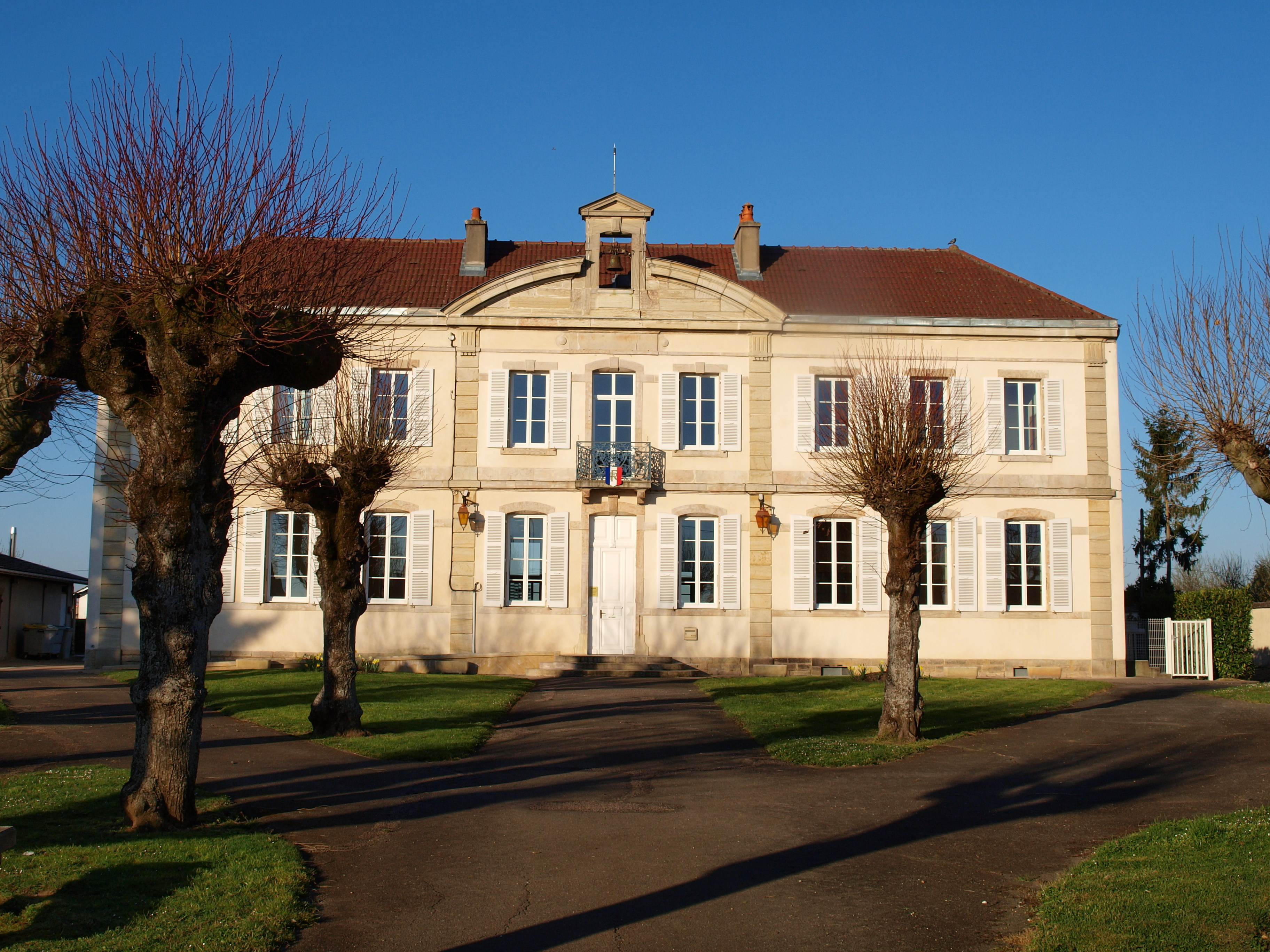 Fénay (Côte-d'Or, France)